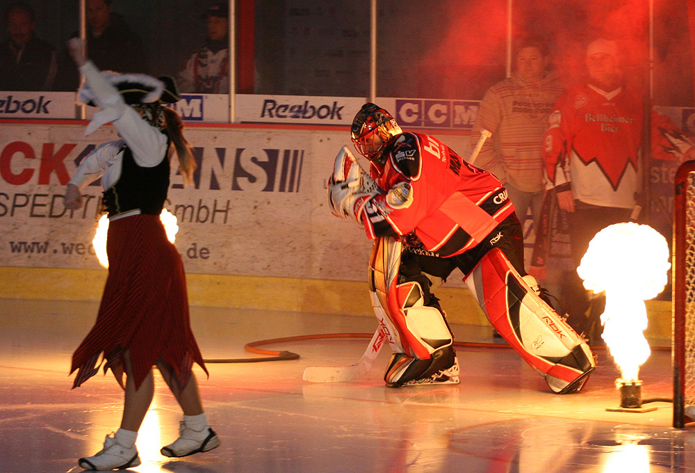 Sinisa Martinovic während der Mannschaftsvorstellung